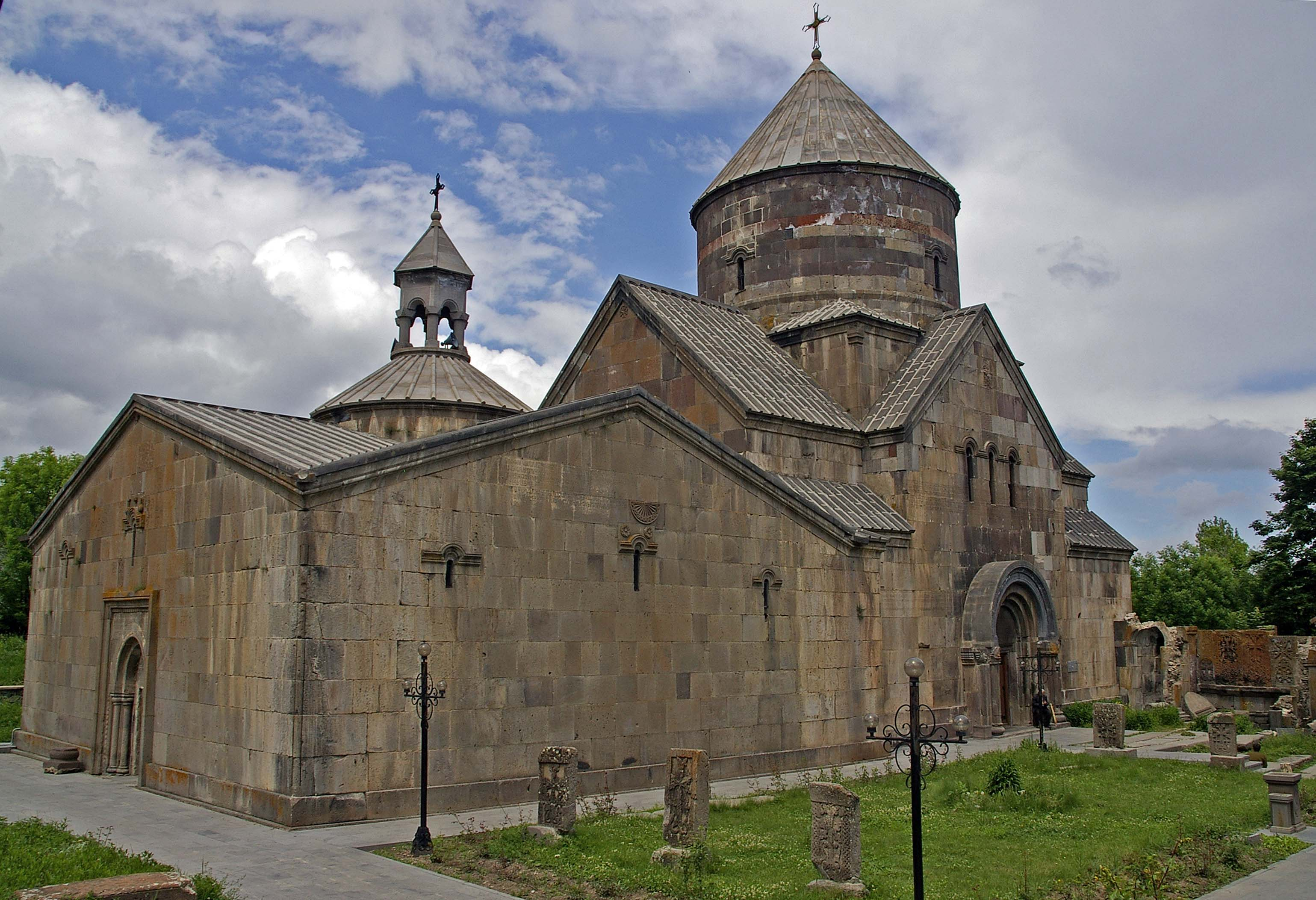 Kloster Ketscharis in Zachatztor Armenien